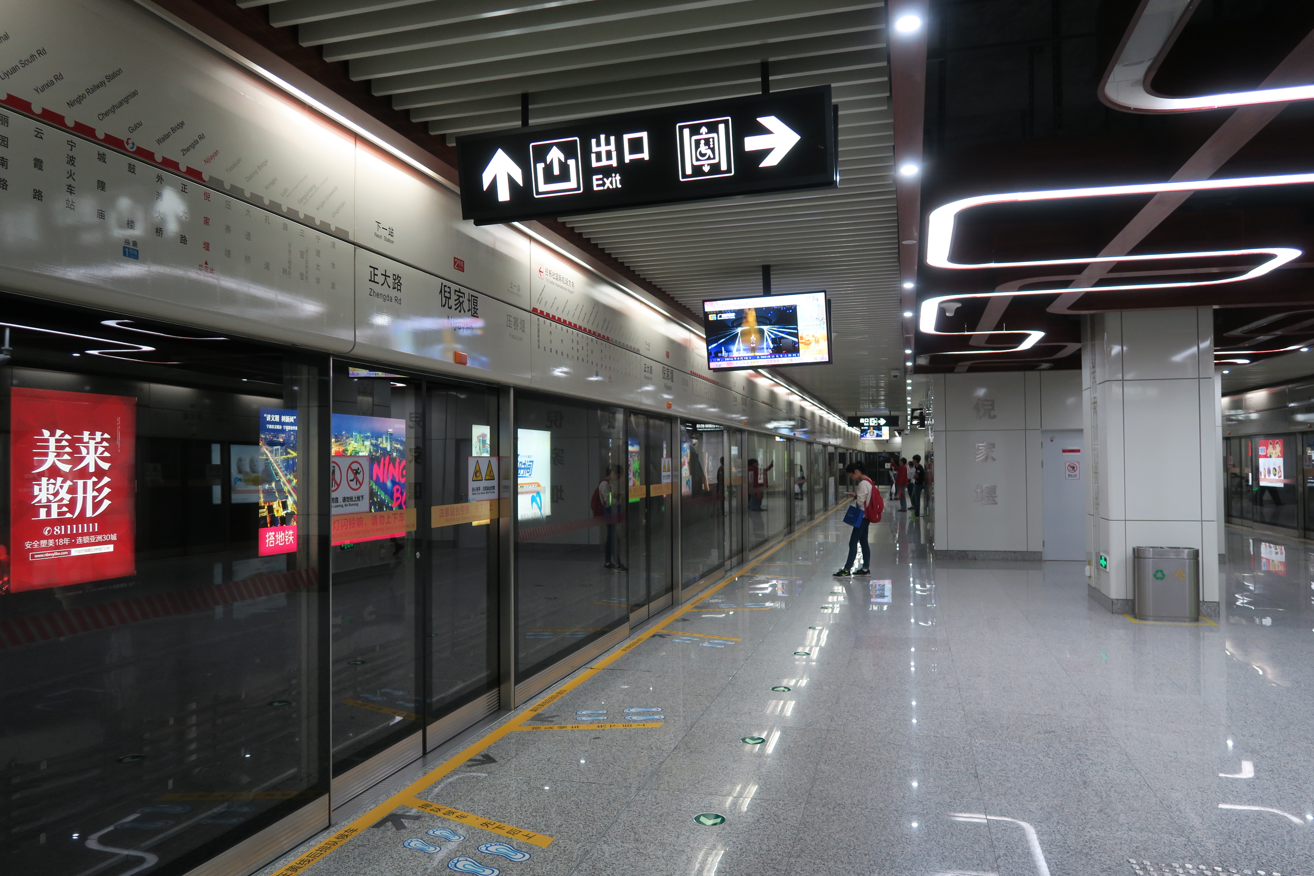 宁波地铁倪家堰站